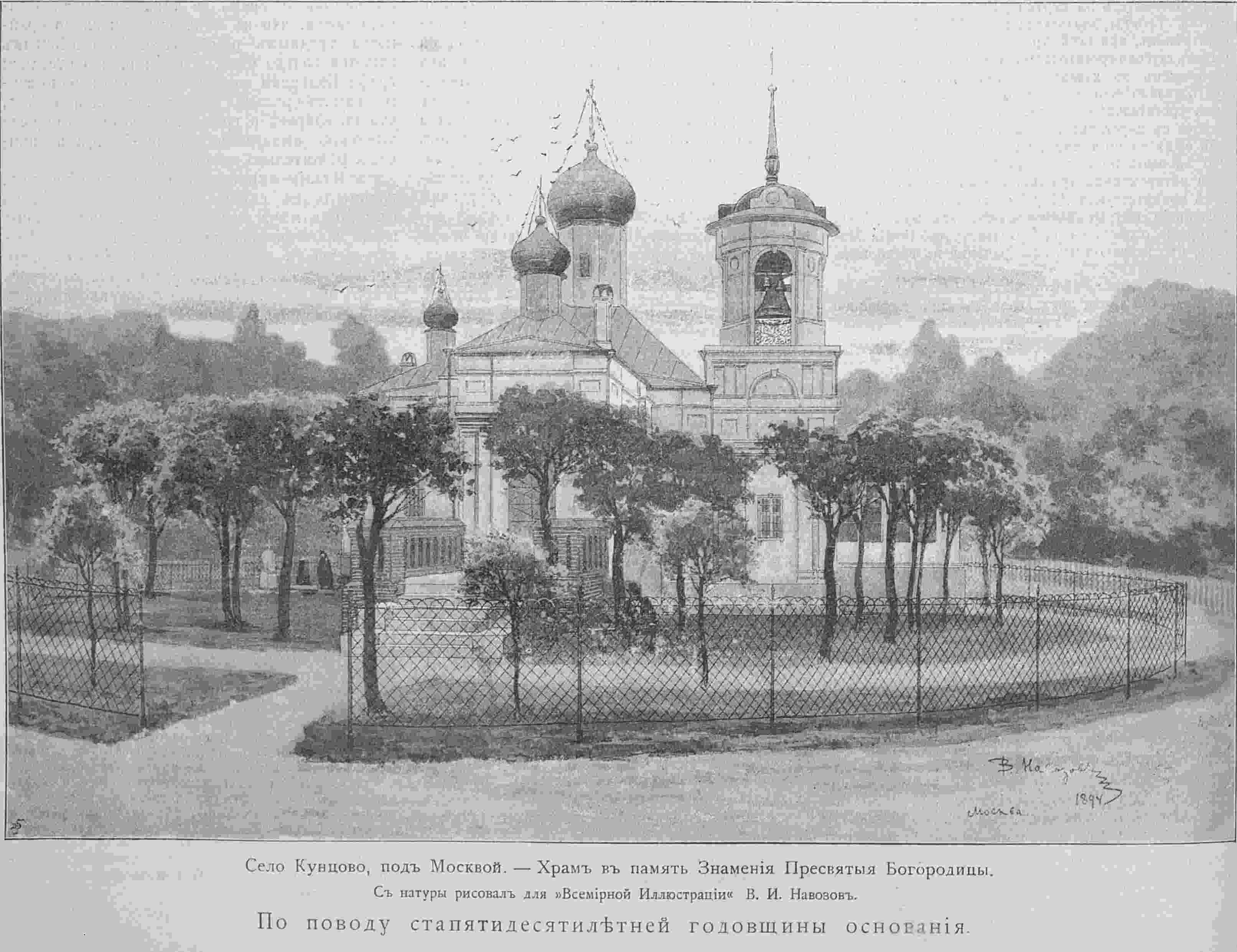 Храм иконы Божией Матери «Знамение» в Кунцеве до перестройки 1911 года